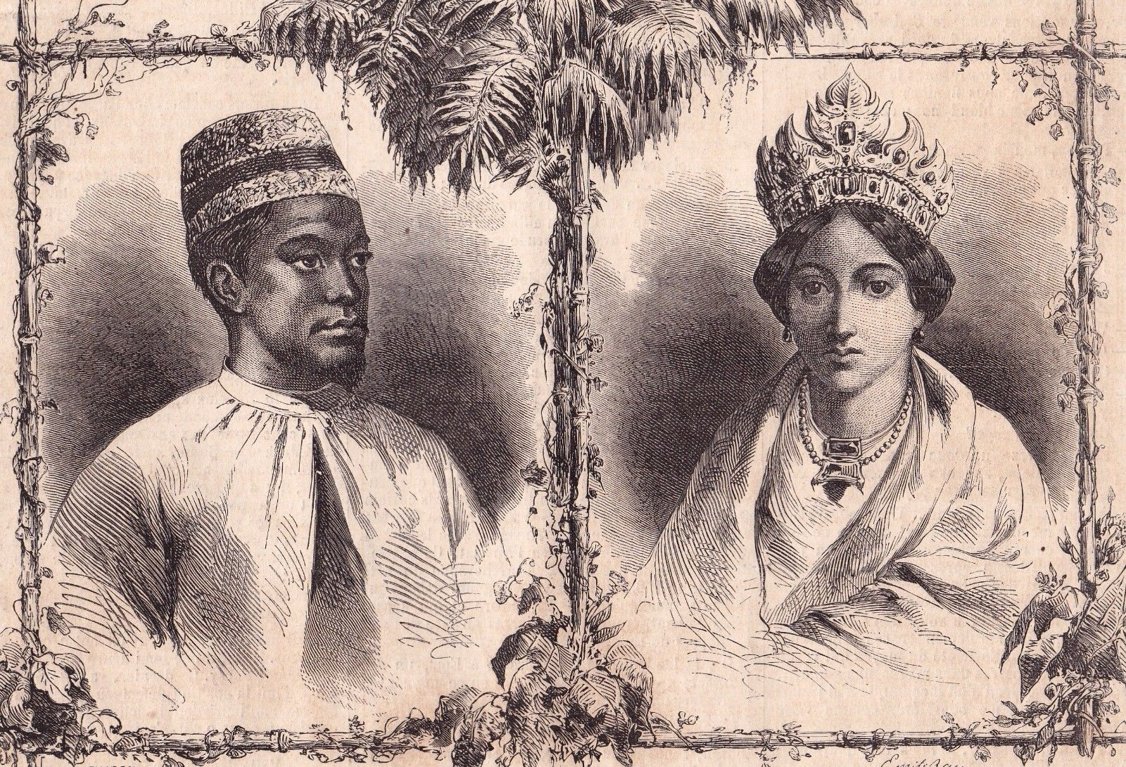 Djoumbé Fatima (1837-1878), regina di Mohéli, e il principe consorte Said Muhammad bin Nasser Mkadara